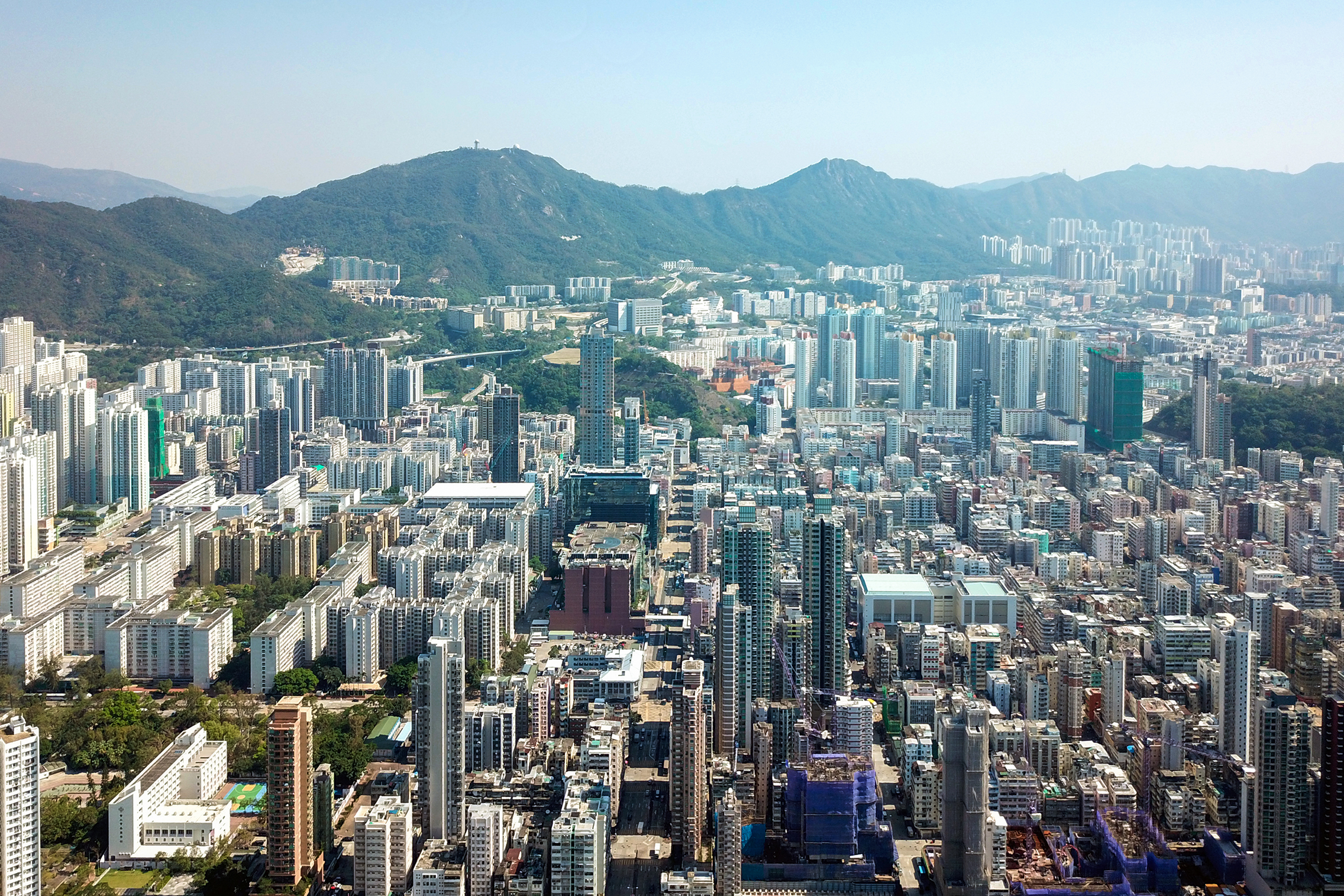 Sham Shui Po